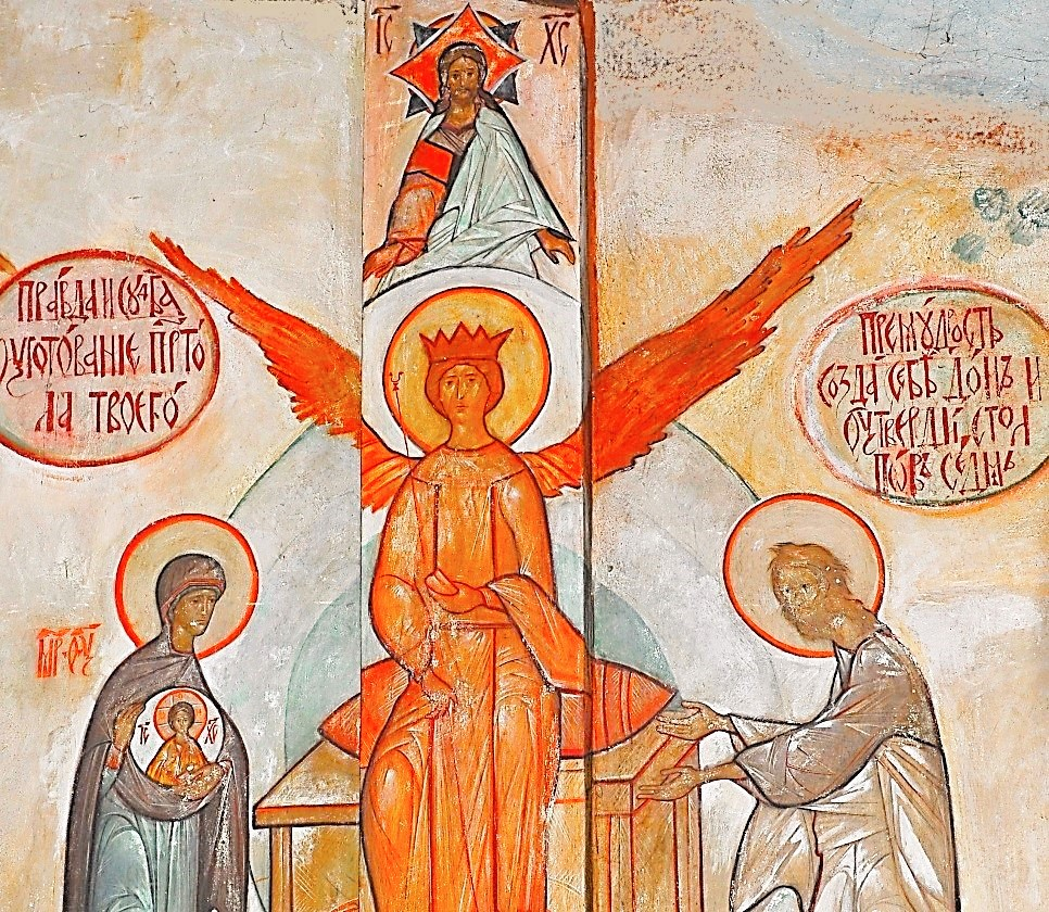 София Премудрость, фреска Григория Круга в Казанском храме